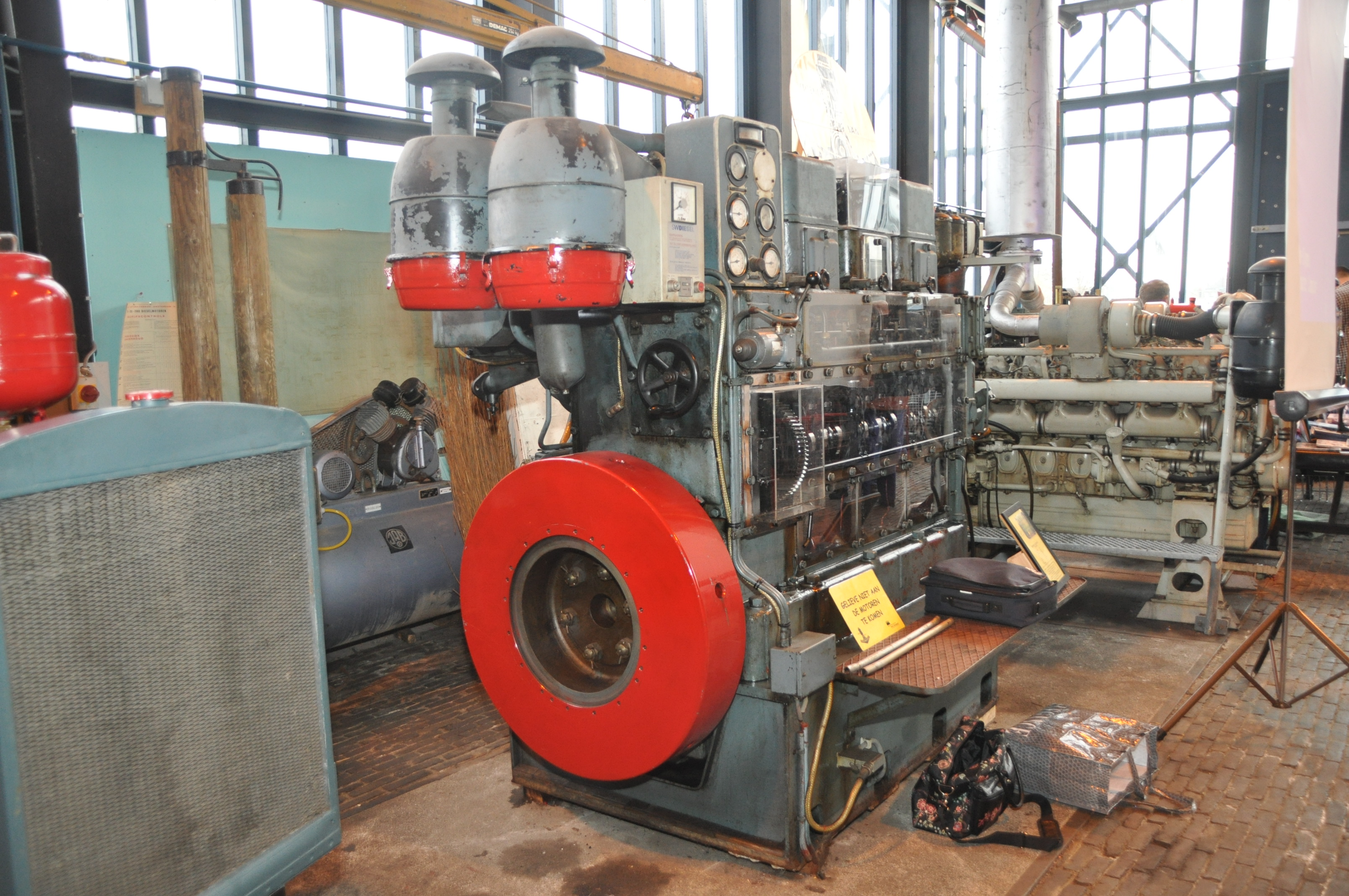 Kromhout diesel engine in the Kromhout museum Amsterdam